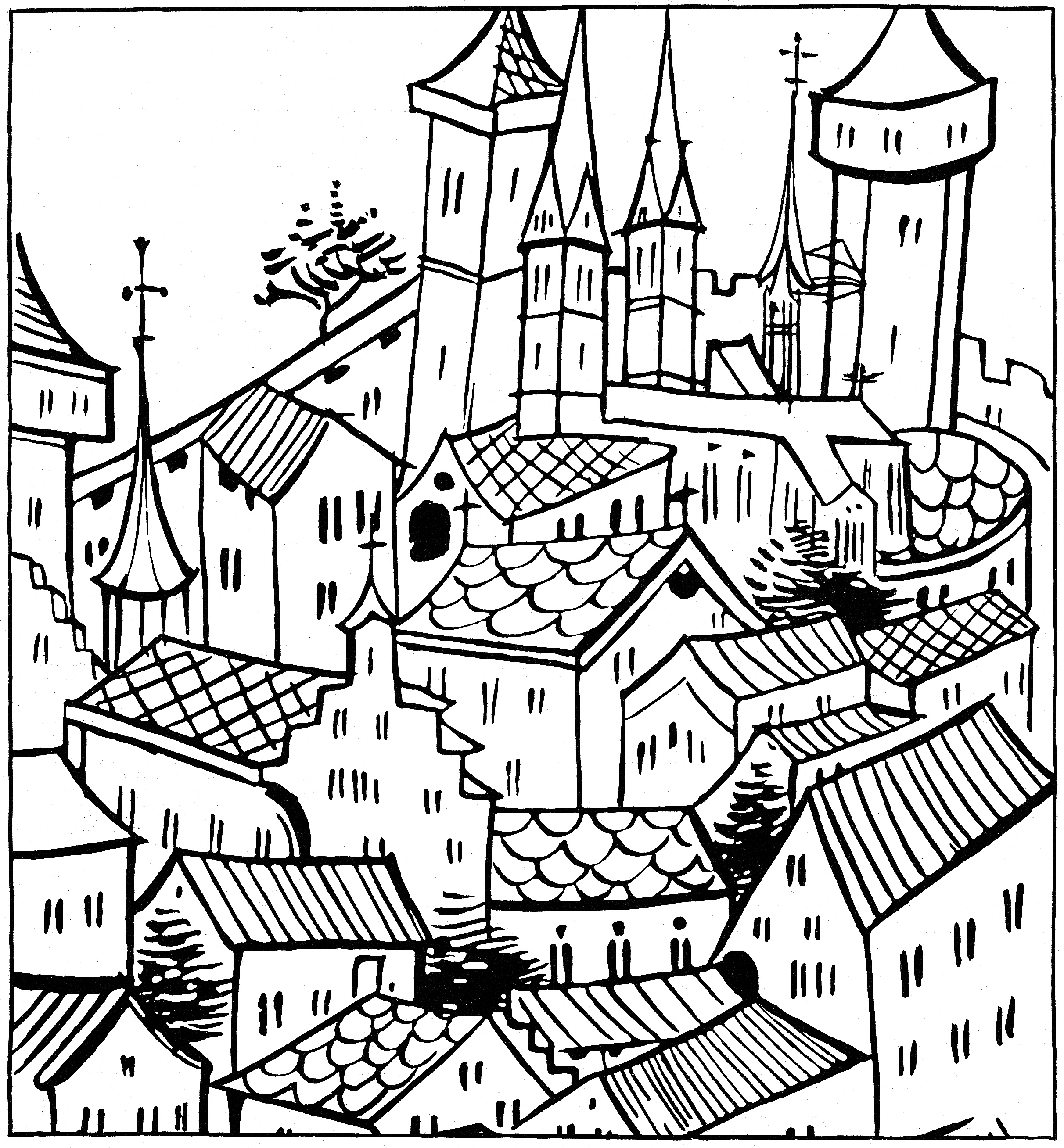 Detail einer Stadtansicht von Konstanz aus der Chronik von Gebhard Dacher, Cod. Sang. 646, 1472–1476